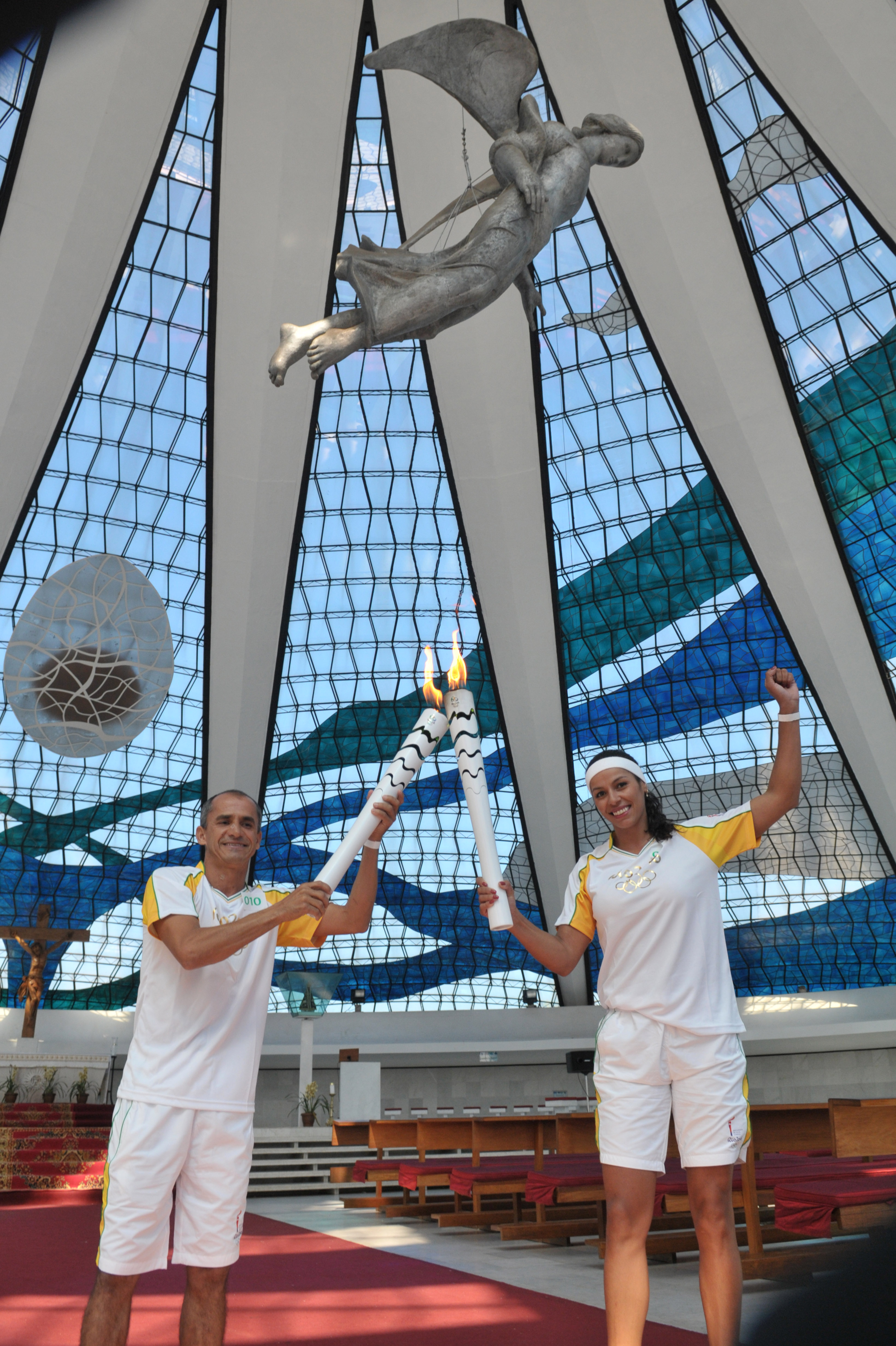 Catedral Metropolitana de Brasília, Brasília, DF, Brasil 3/5/2016 Foto: Mary Leal/Agência Brasília A bicampeã olímpica de vôlei Paula Pequeno passa a chama olímpica ao medalhista de bronze na maratona dos Jogos de Atenas, em 2004, Vanderlei Cordeiro Lima.